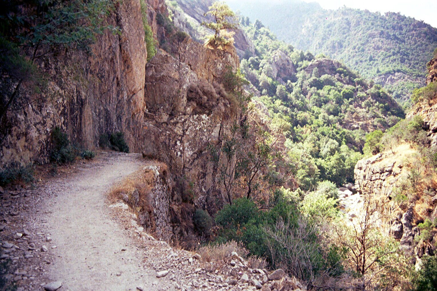 Gorges de Spelunca, Corsica.